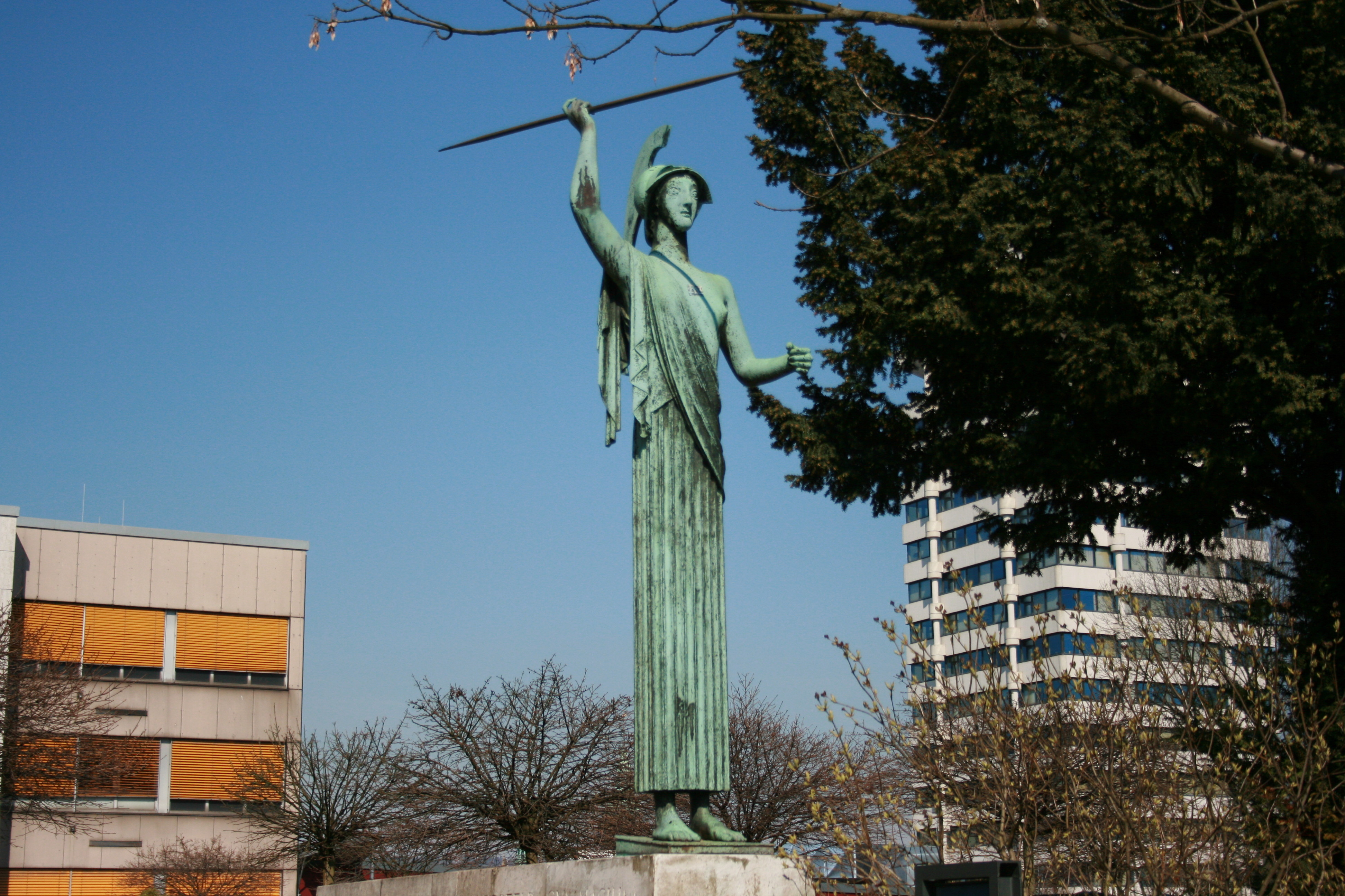 Pallas Athene von Arno Breker im Skulpturenpark Johannisberg, Wuppertal